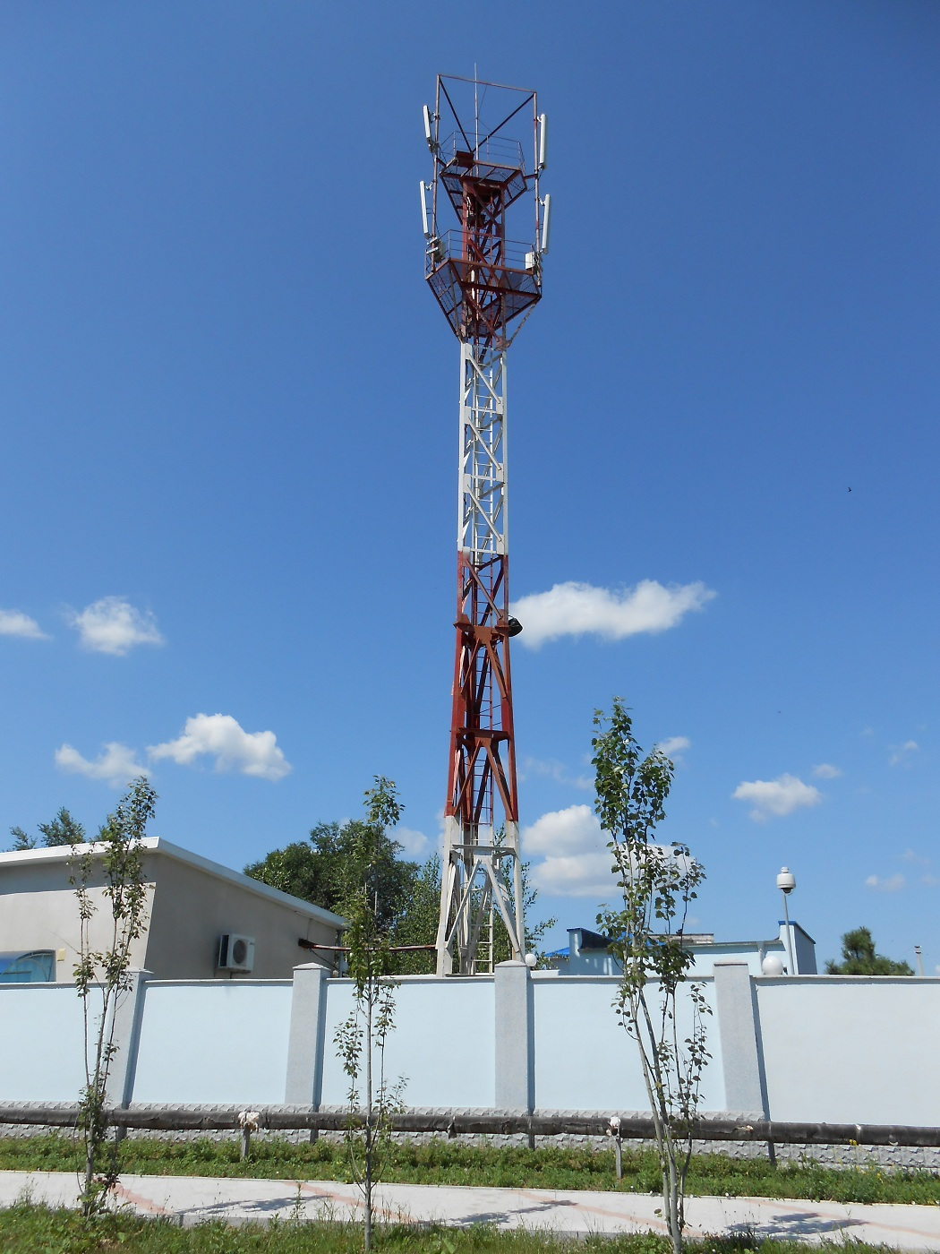 Сотовая вышка компании ИДК между Тирасполем и Ближним Хутором. Технология связи - CDMA.